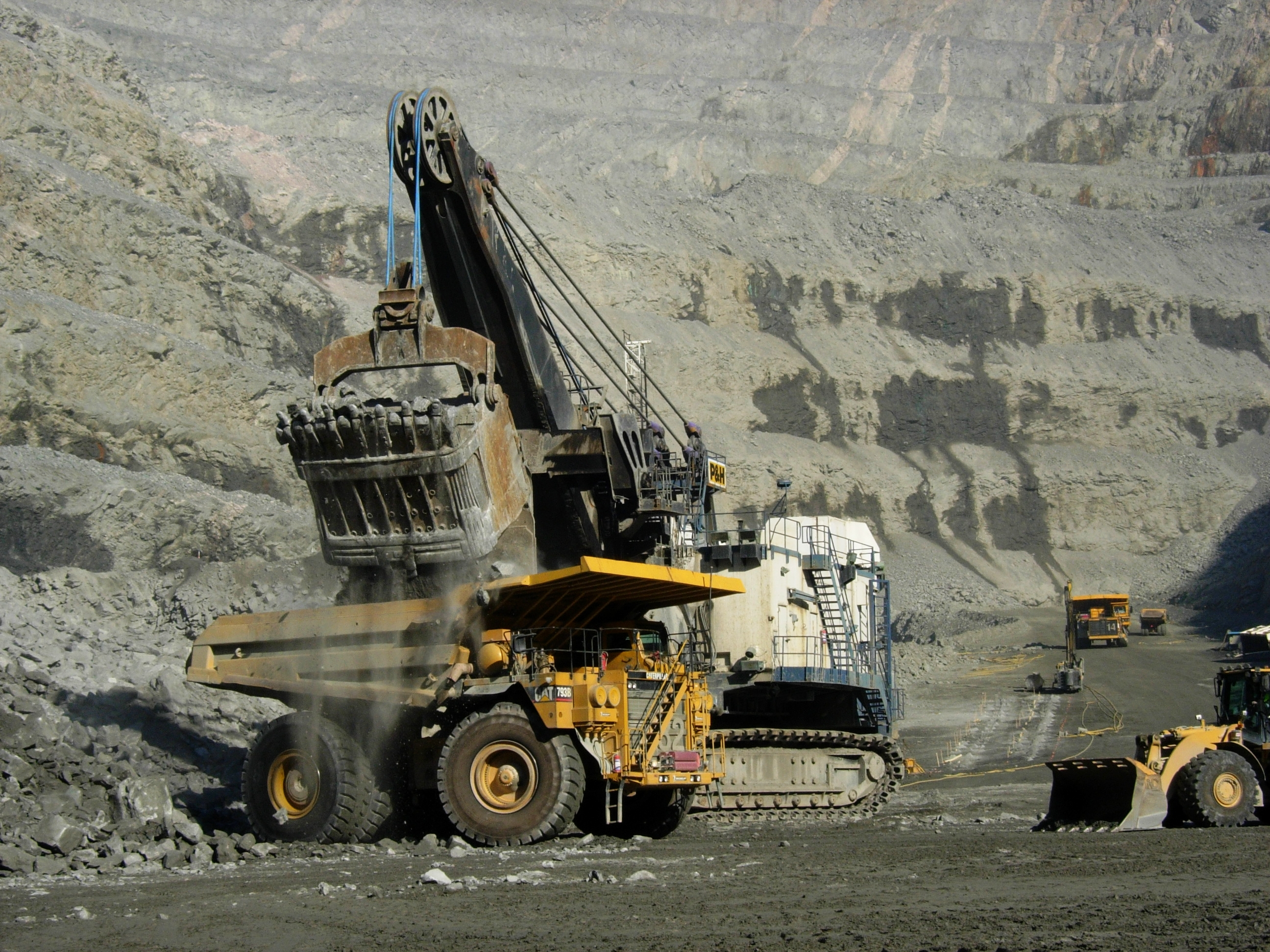 Lastning av malmtruck i Bolidens gruva Aitik i Norrbotten (kopparmalm). Photograph: Erik Jonsson, SGU